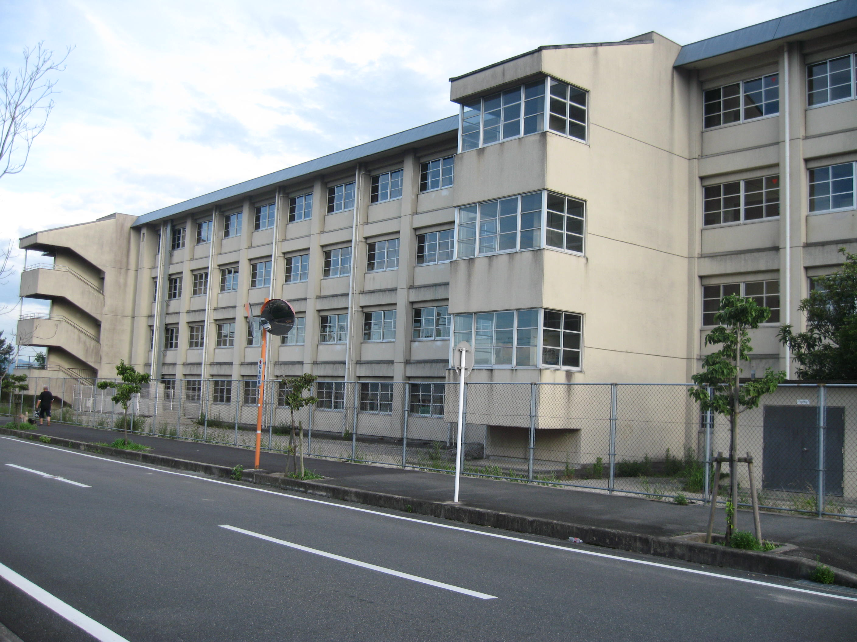 crown userが2011年8月6日に男山中学校の北側から撮影した画像